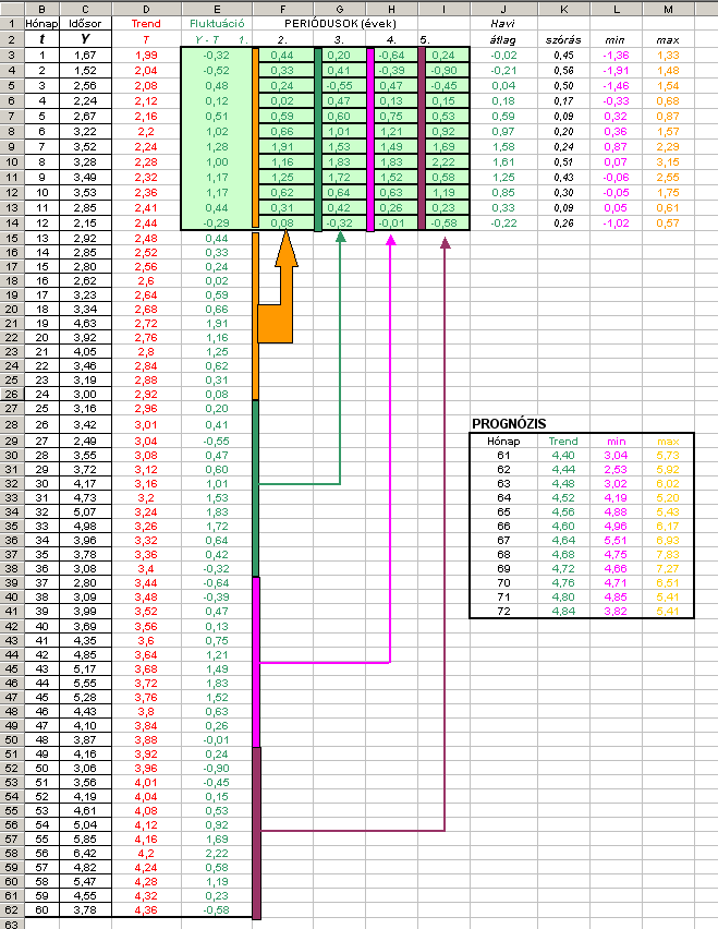 Excel Work for Time series analysis